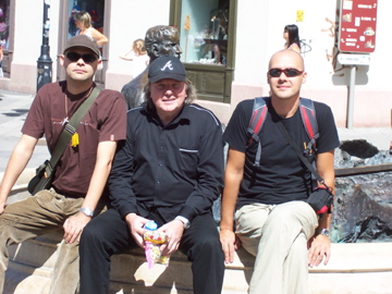 Description: Jazz Trio Oles Jörgensmann Oles in Györ Source: Own work Foto: Aktiver Arbeiter Date: 5, September 2006